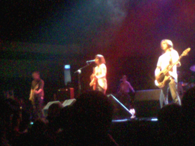 Charlotte Hatherlay bei Rock im Park 07 auf der Club-Stage.